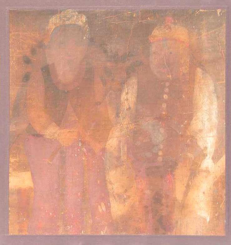 사신당 무신도 및 현판 일괄 - 중국사신도